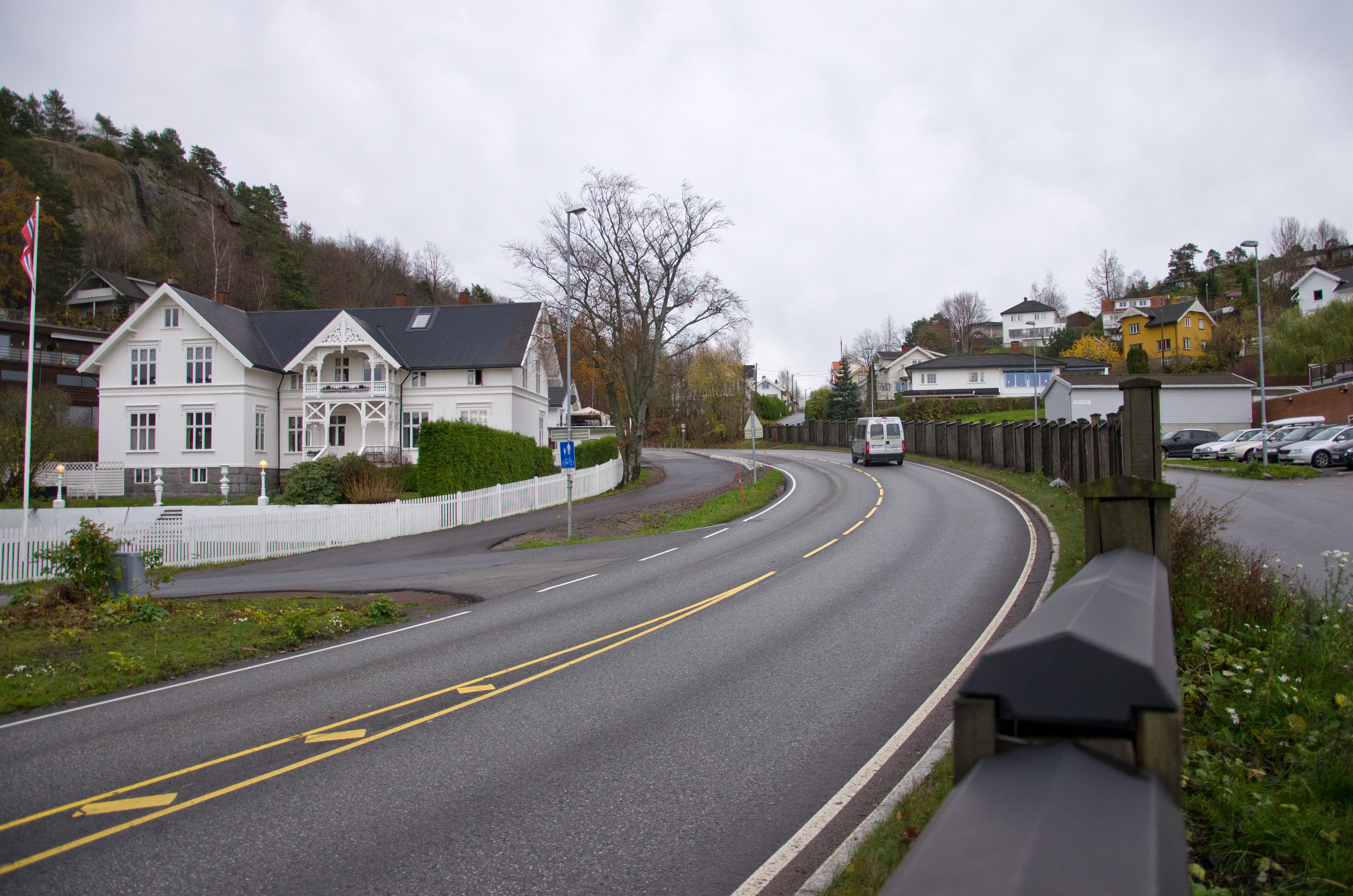 Vestfolds fylkesvei 260 Vesterøyveien